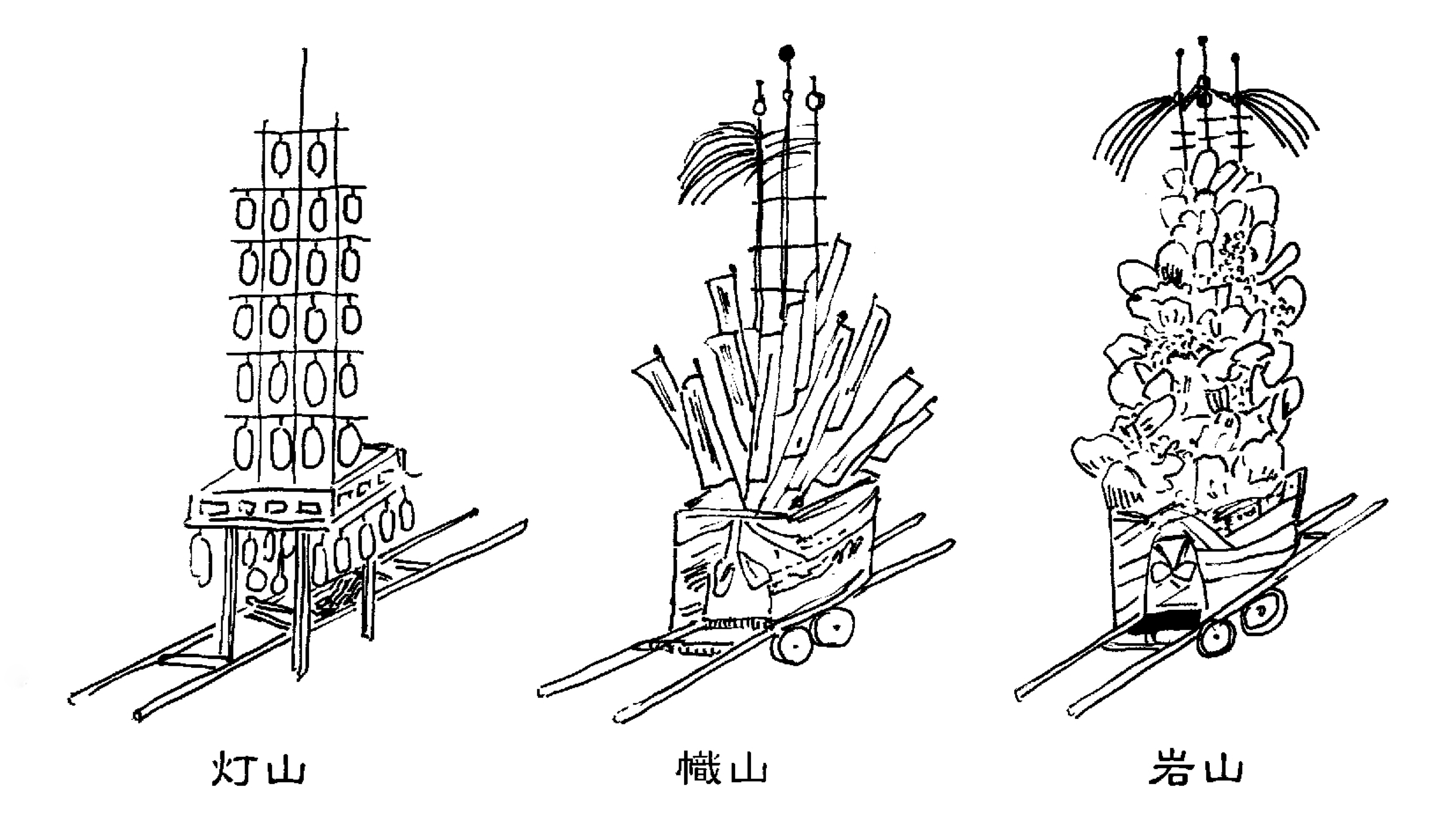 九州の路 祭儀と民俗